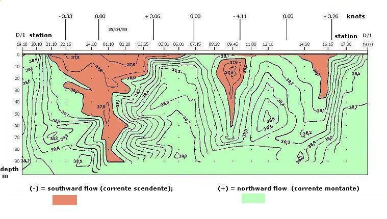 Distribuzione delle differenti masse d'acqua nello Stretto di Messina (Ganzirri) nell'arco di 24 ore. Water masses distribution in the Straits of Messina (Ganzirri - Sicily) during a 24 hours survey.